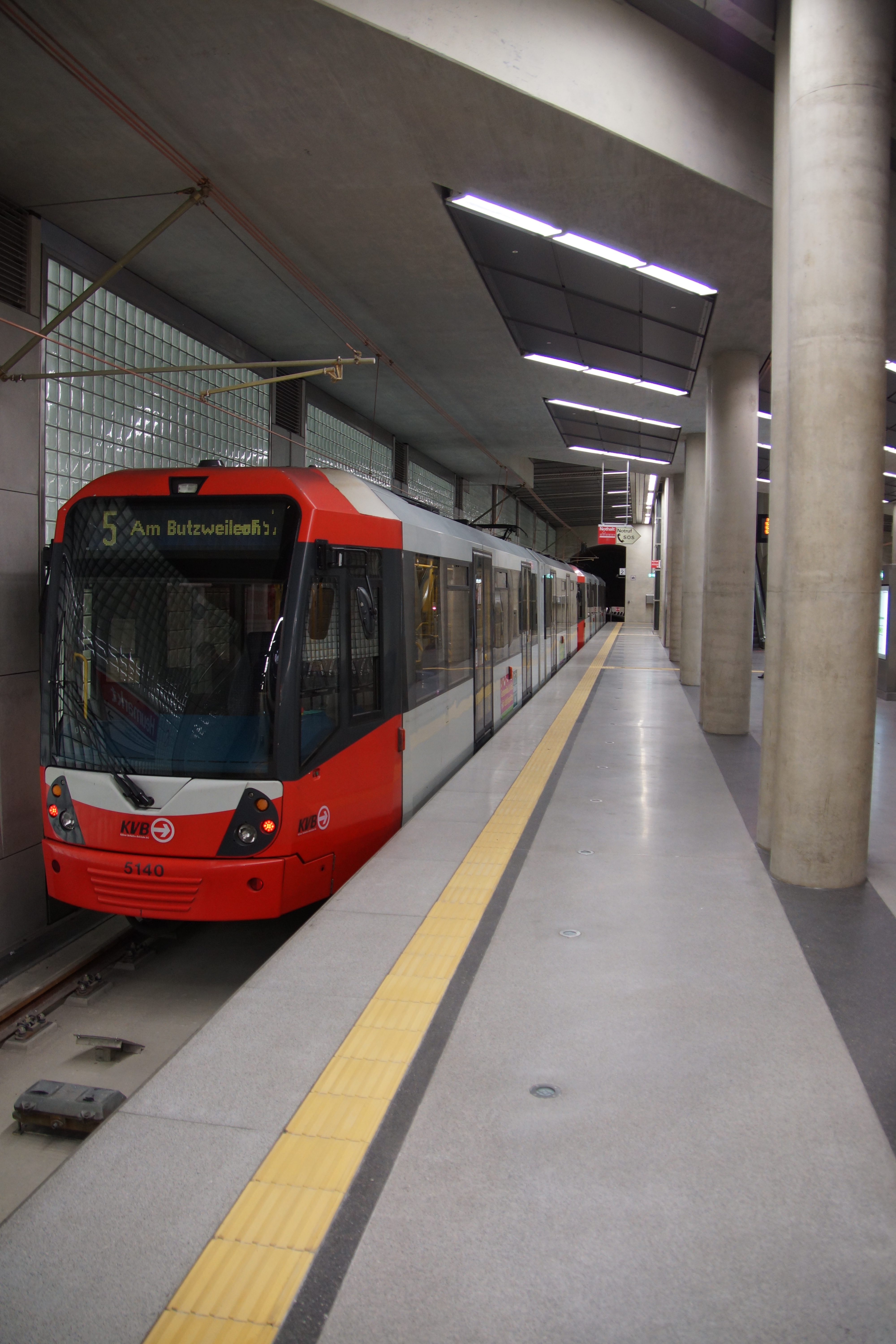 unterirdische Stadtbahnhaltestelle Heumarkt der Nord-Süd-Stadtbahn, untere Ebene, Nord-Süd-Bahn, Linie 5